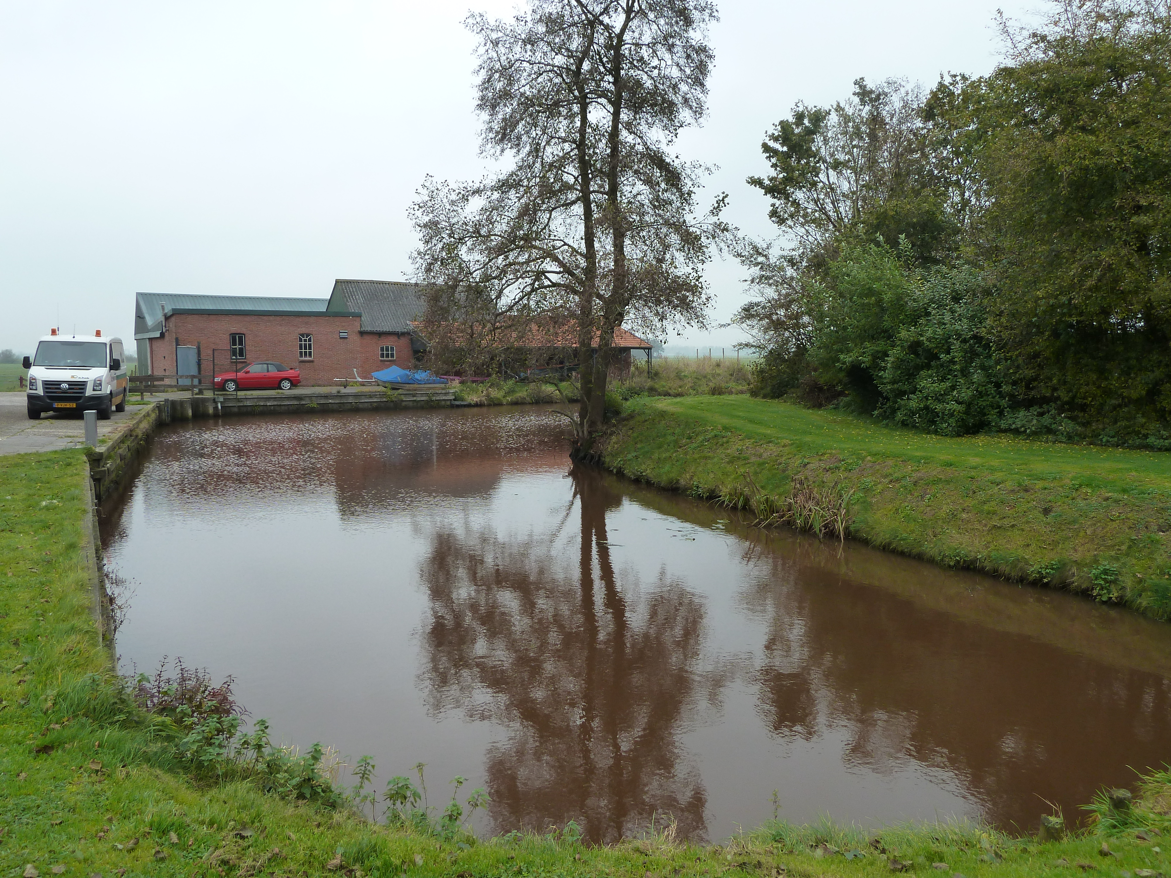 Het vroegere haventje van Niekerk met op de achtergrond het oude gemaal.